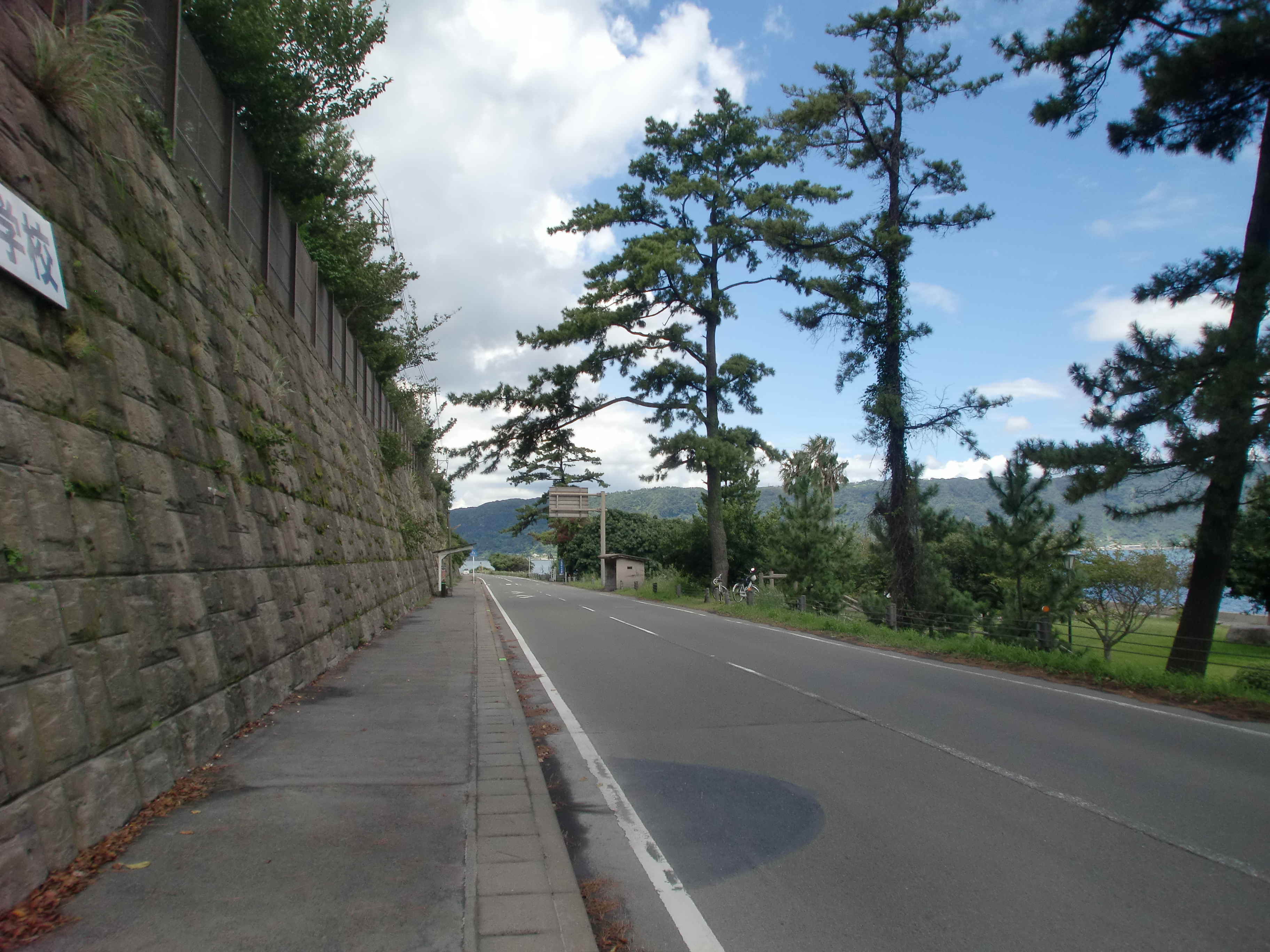 鹿児島県道26号桜島黒神線を桜島中学校下から桜島港方面を望む